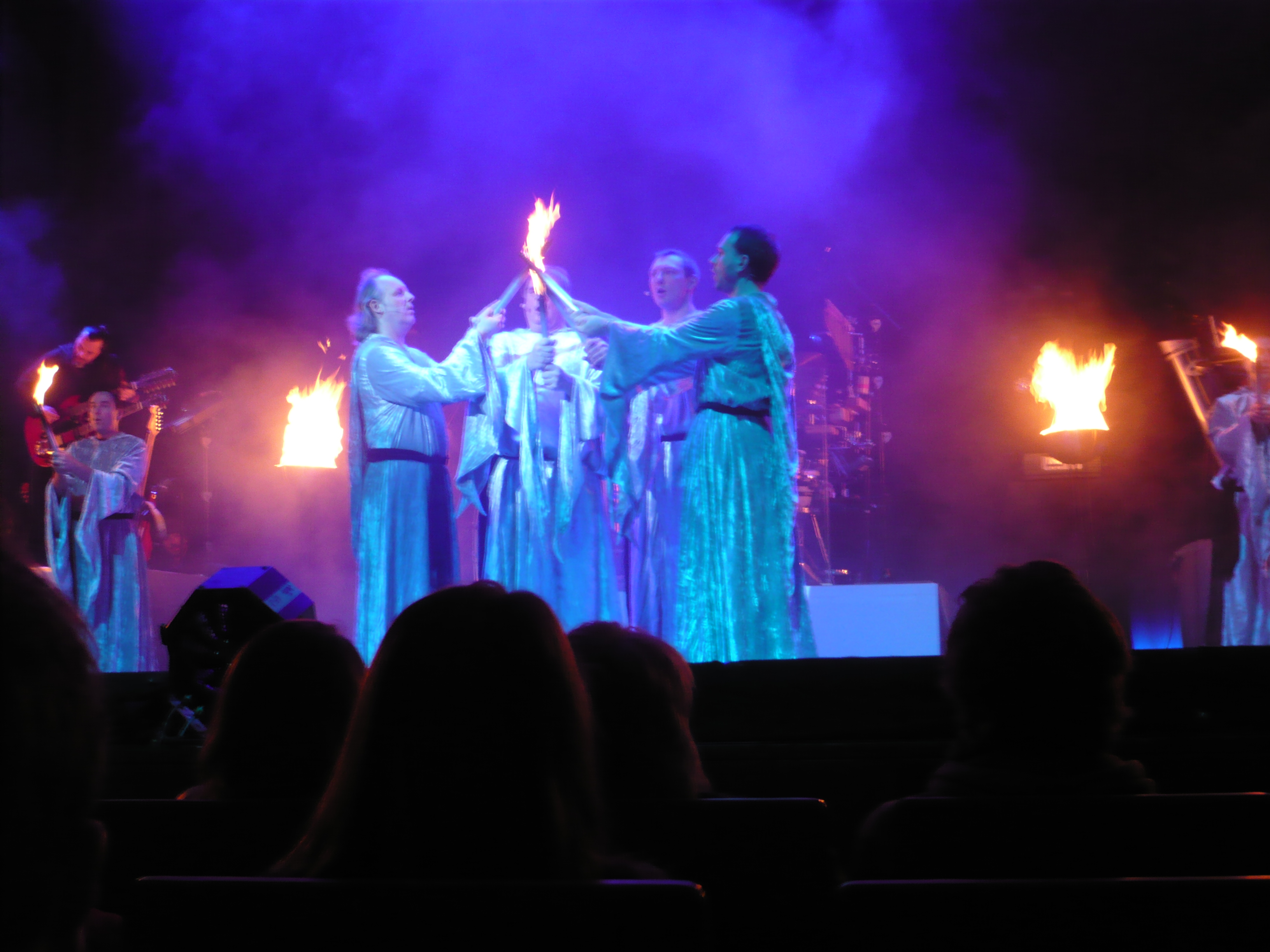 Gregorian und Amelia Brightman live im Konzerthaus Freiburg